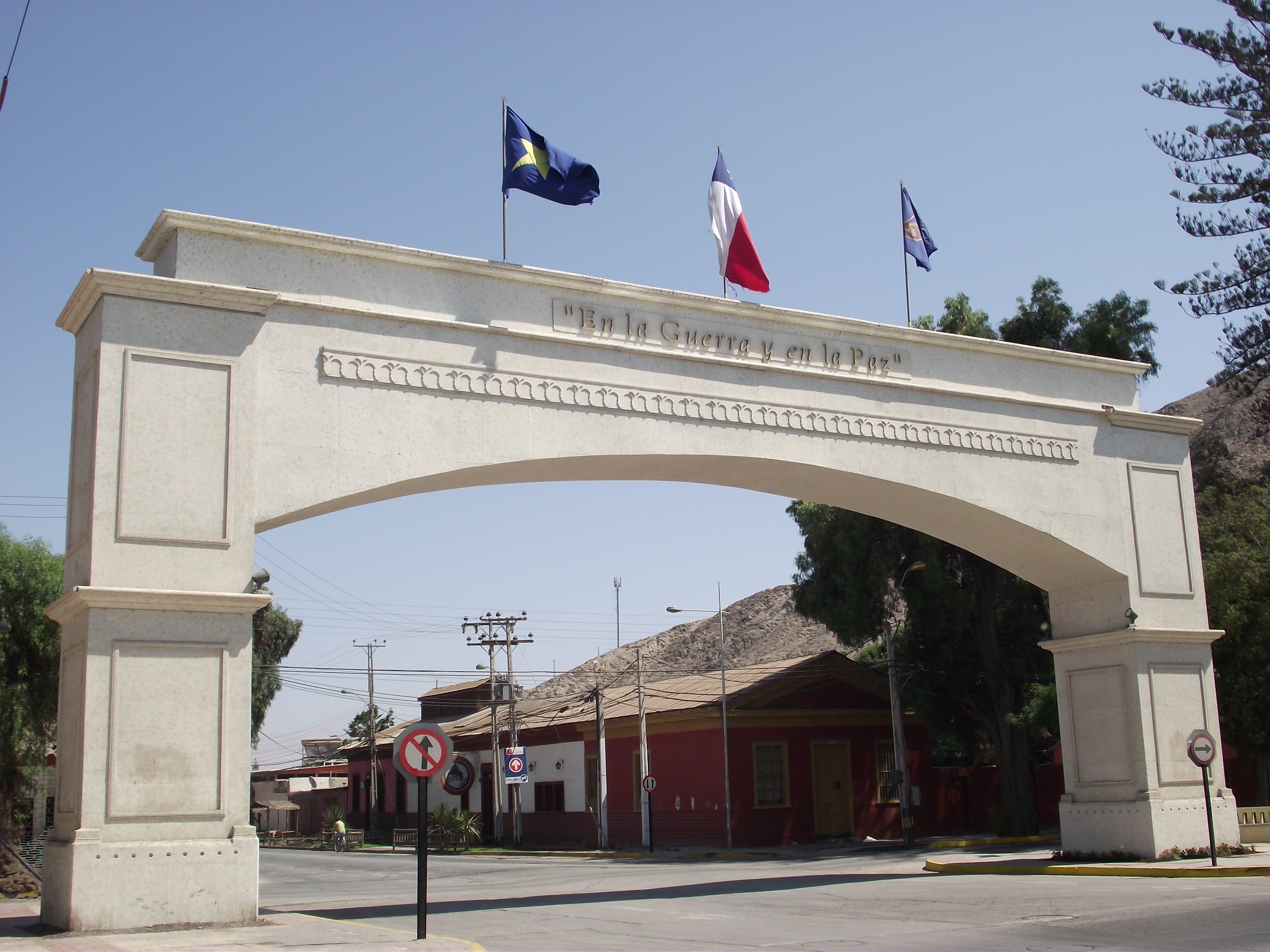 Arco "Honor y Gloria a los Héroes en la Guerra y en la Paz", ubicado en Copiapó, Chile.